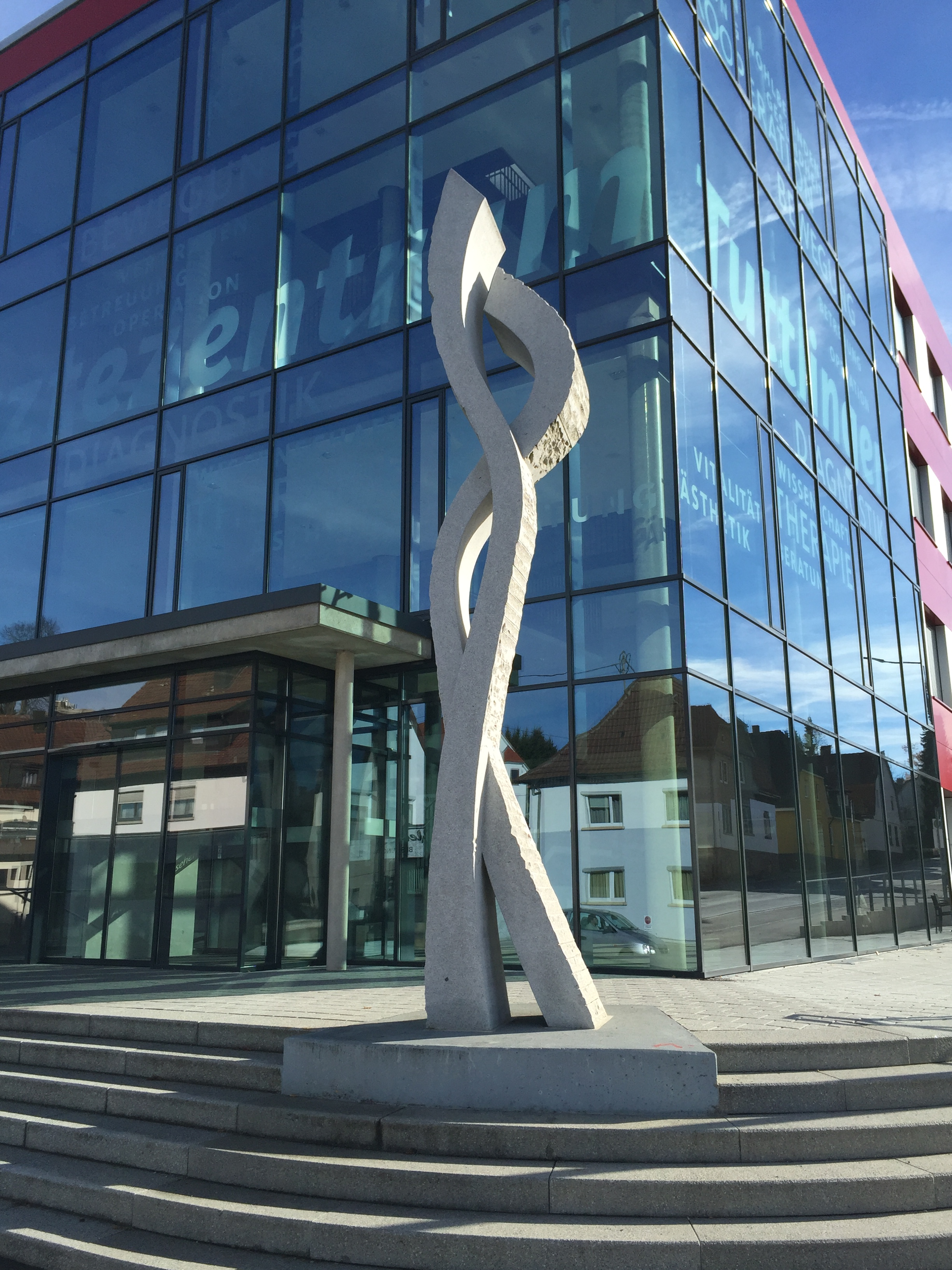 Skulptur im Großformat von Frank Teufel, Material Granit